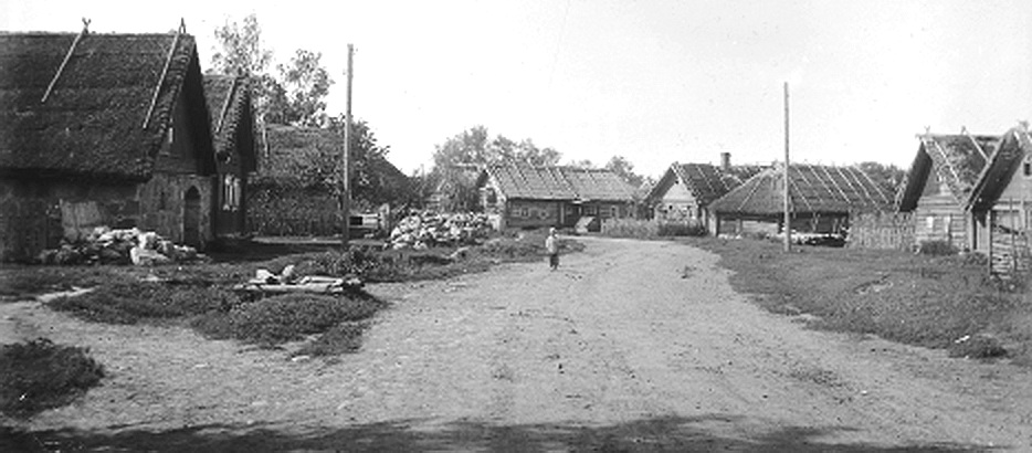 Деревня Кёрстово.